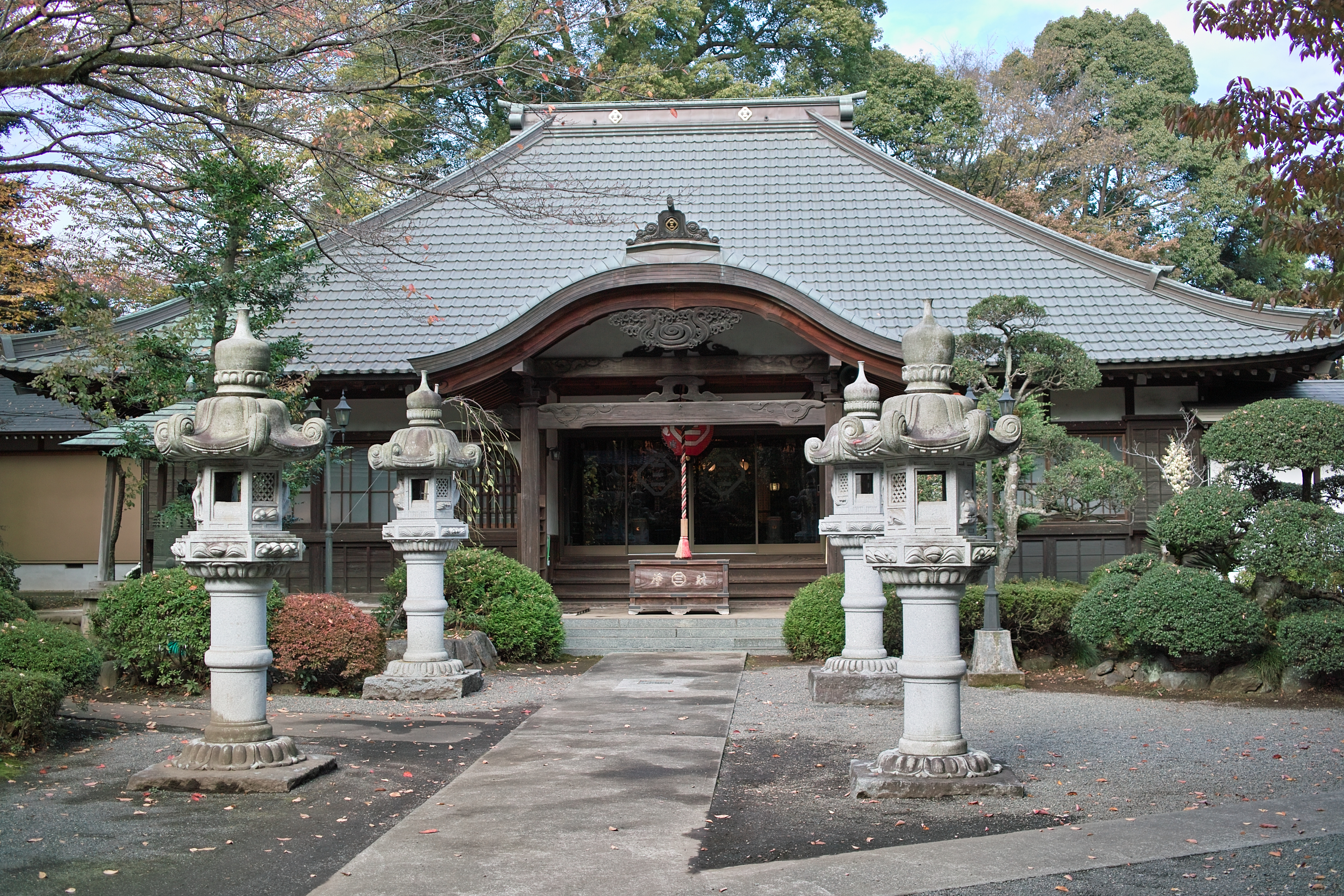 当麻山無量光寺